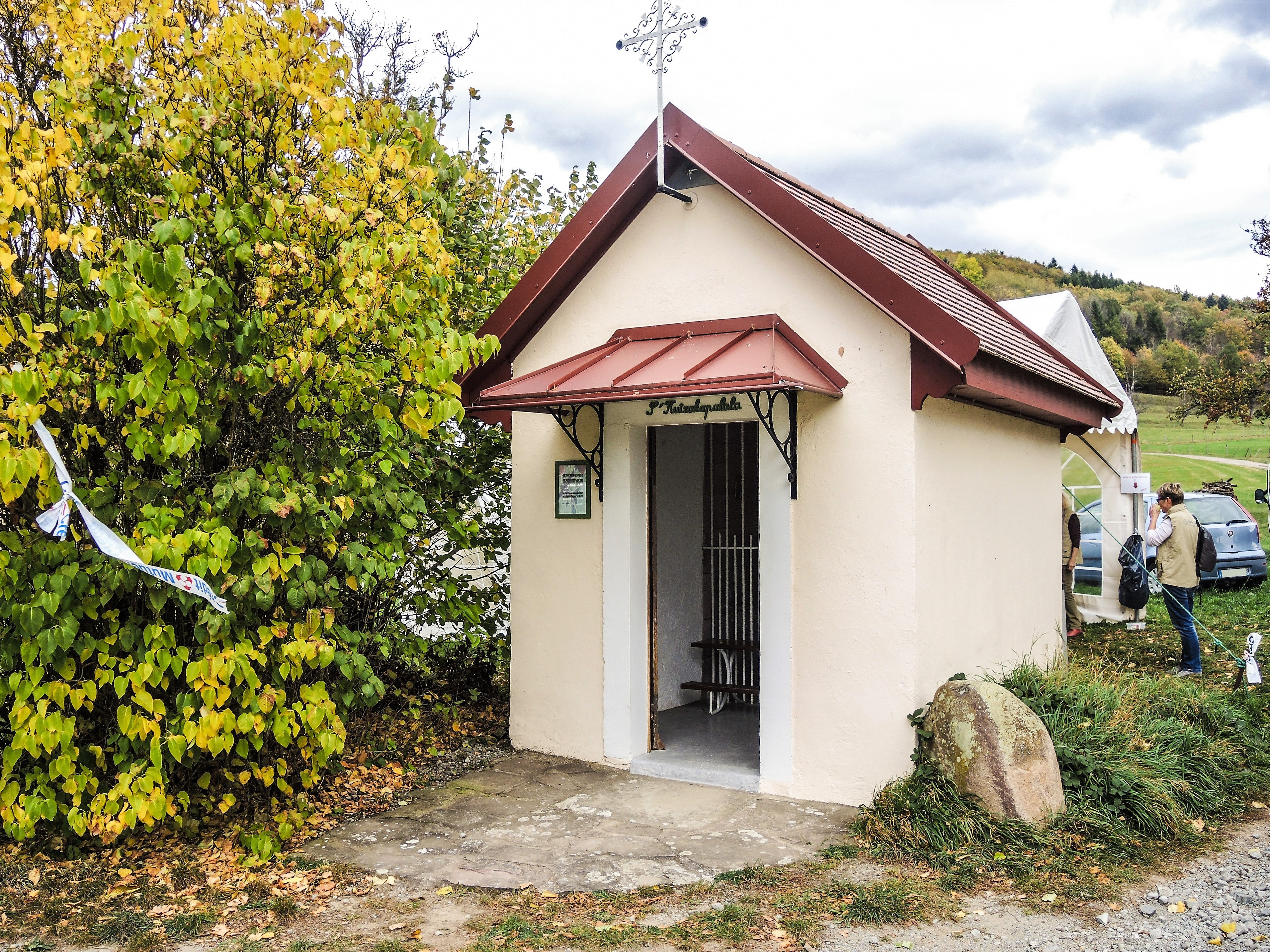 La chapelle des chouette domine le village de Sickert. Haut-Rhin.